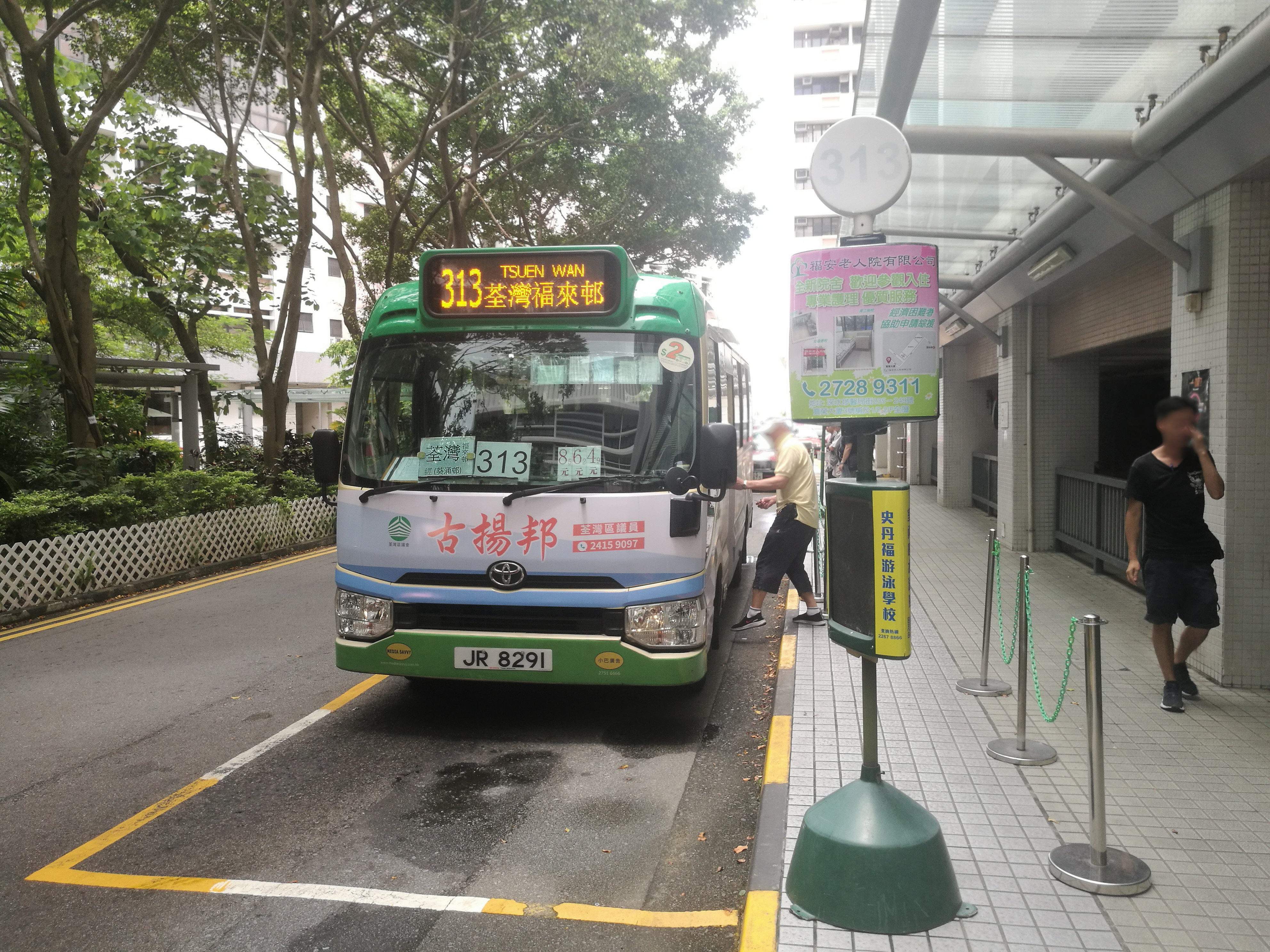 小巴JR8291的照片